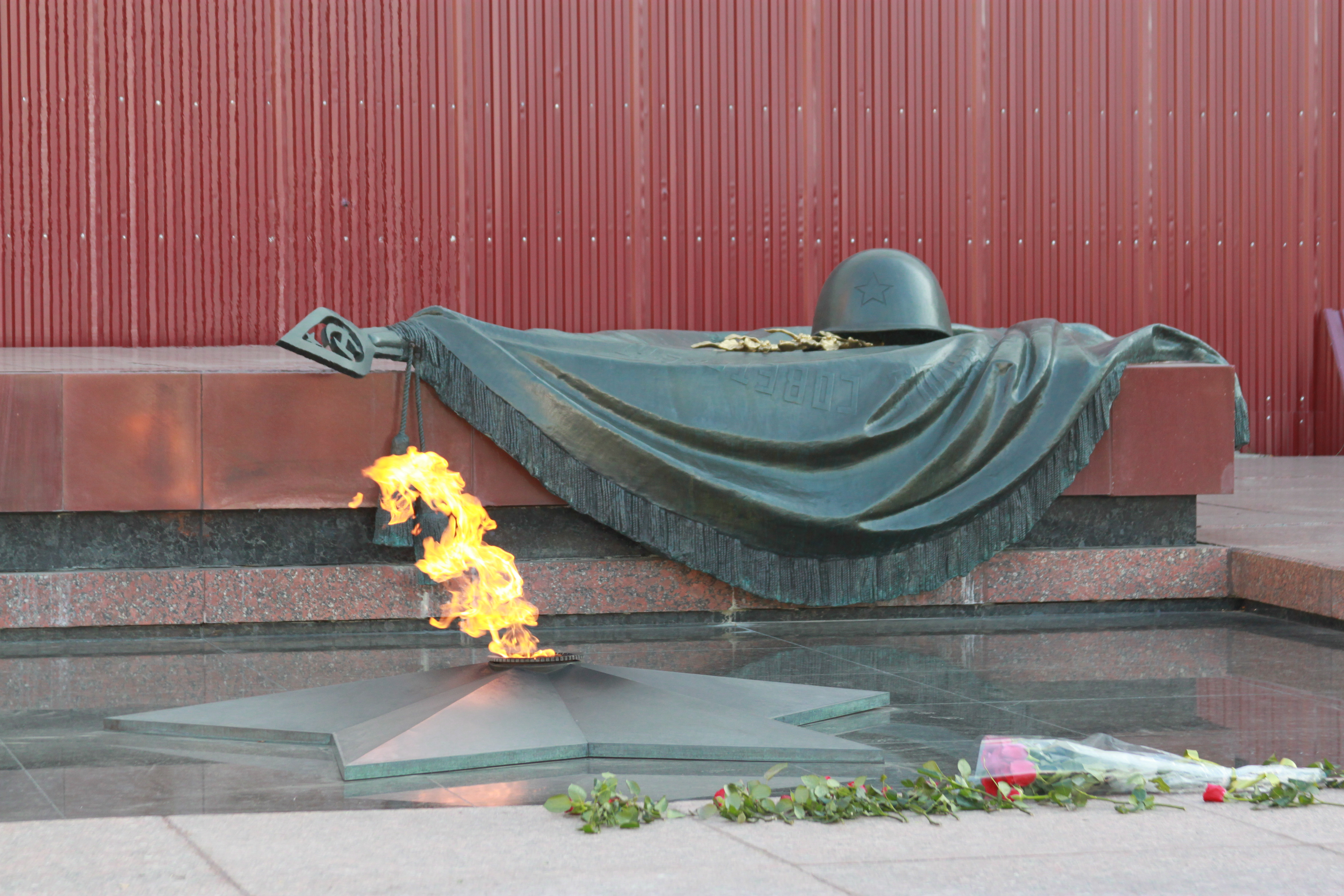 2014 Moscow Tomb of the Unknown Soldier Москва Могила неизвестному солдату. Вечный огонь. Александровский сад.